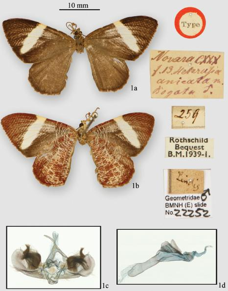 Hagnagora anicata (F. & R.), male lectotype a dorsal view b ventral view c genital capsule and d aedeagus (BMNH slide 22252).